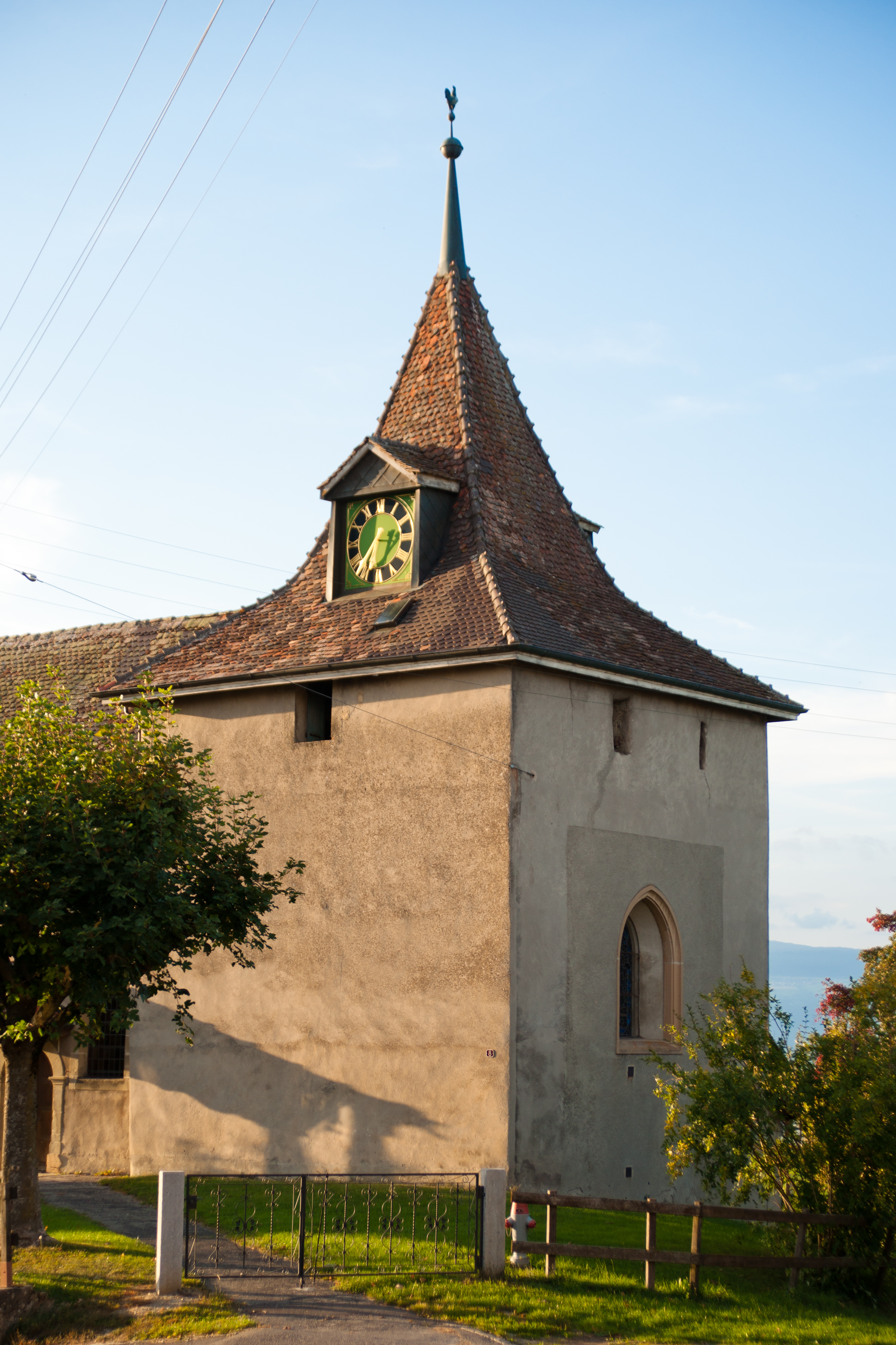 Église de Vuarrens, canton de Vaud, Suisse.